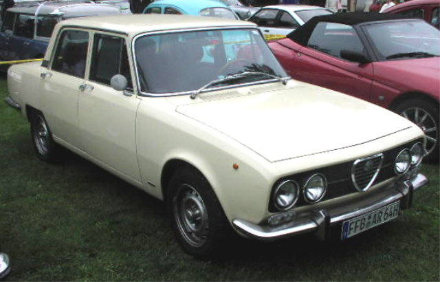 Alfa-Romeo 2000 Sedan